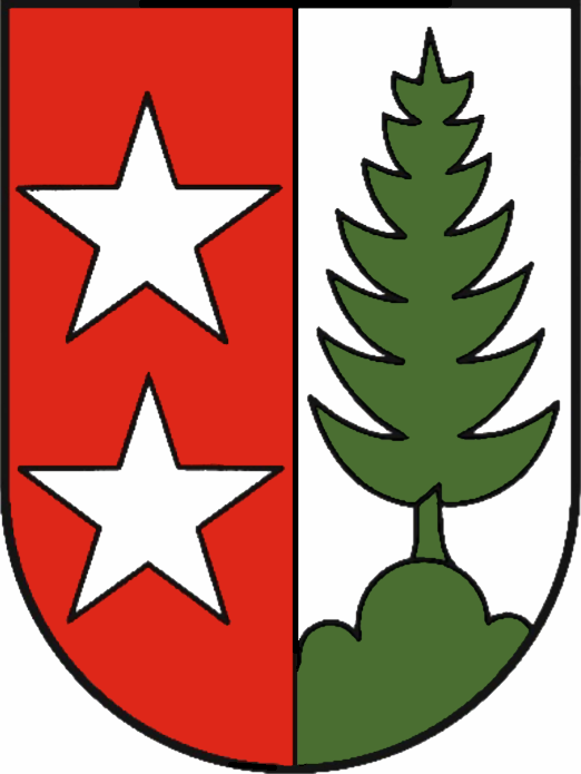 Warth, Vorarlberg: Im längsgeteilten Schild im rechten roten Feld zwei Walsersterne in Silber, im linken silbernen Feld auf grünem Dreiberg eine grüne Tanne mit aufsteigenden Ästen. (Geteilt von Rot und Silber, vorn zwei silberne fünfzackige Sterne, hinten eine Tanne mit aufsteigenen Ästen auf einem grünen Dreiberg, Verleihung: 21. Juli 1970)